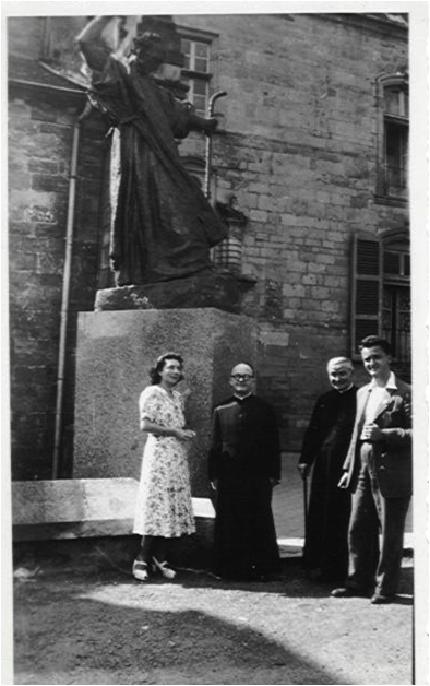 Mlle M.M. Dubois devant la statue de Saint Colomban à Luxeuil